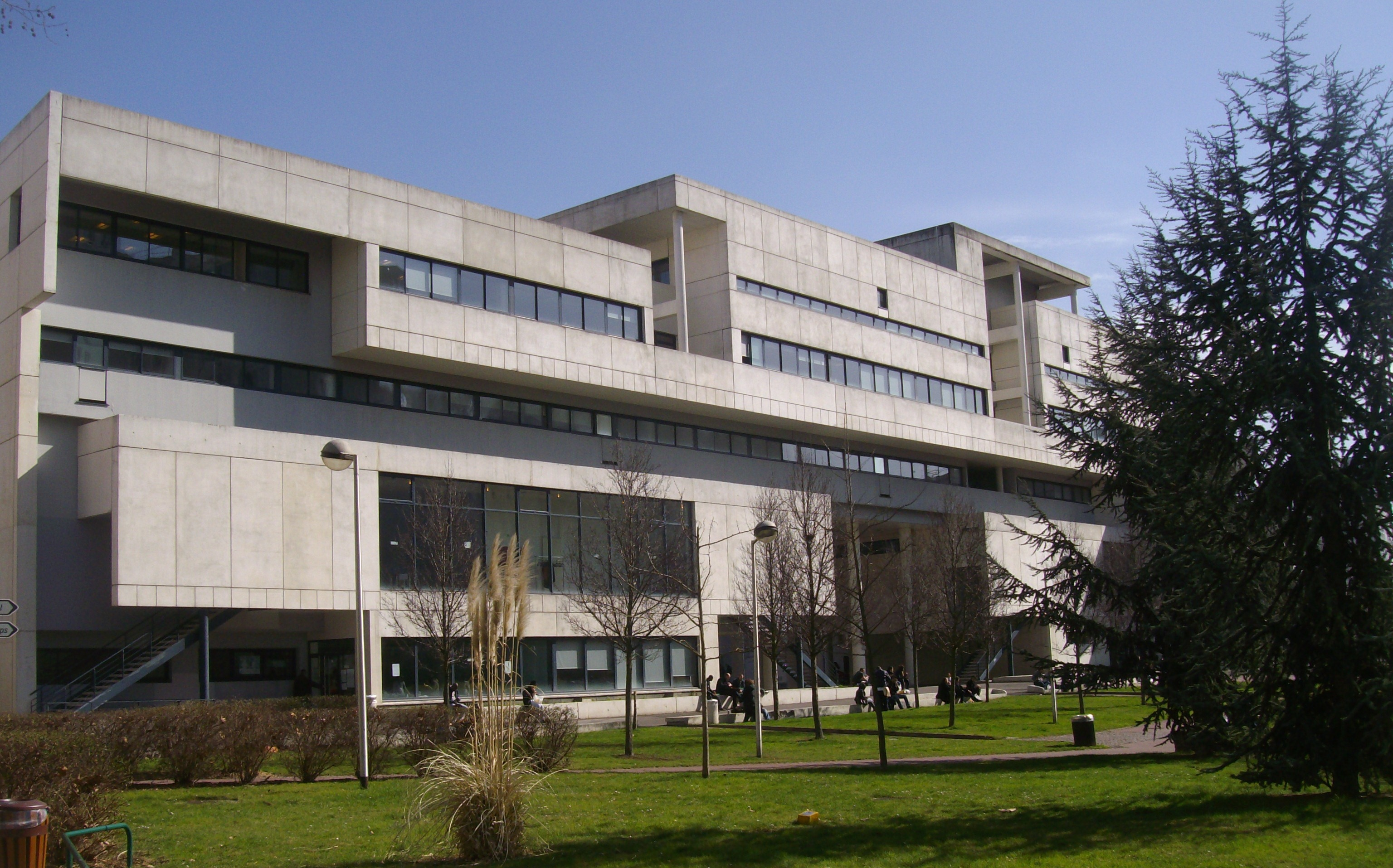 L'Université Paris-Est Créteil Val-de-Marne (UPEC) à Créteil.